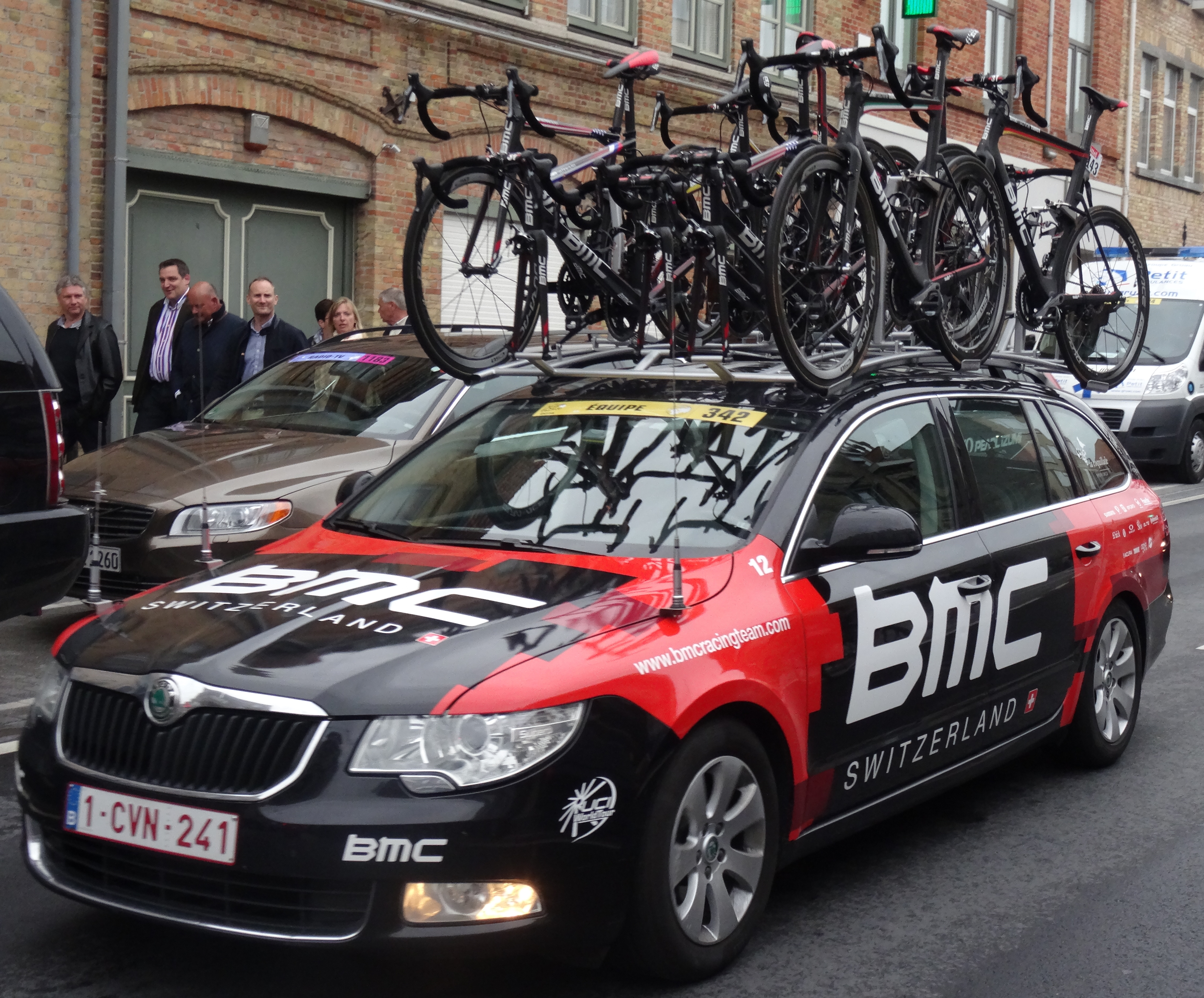 Reportage photographique réalisé le mercredi 9 juillet à l'occasion du départ de la cinquième étape du Tour de France 2014 à Ypres, Belgique.